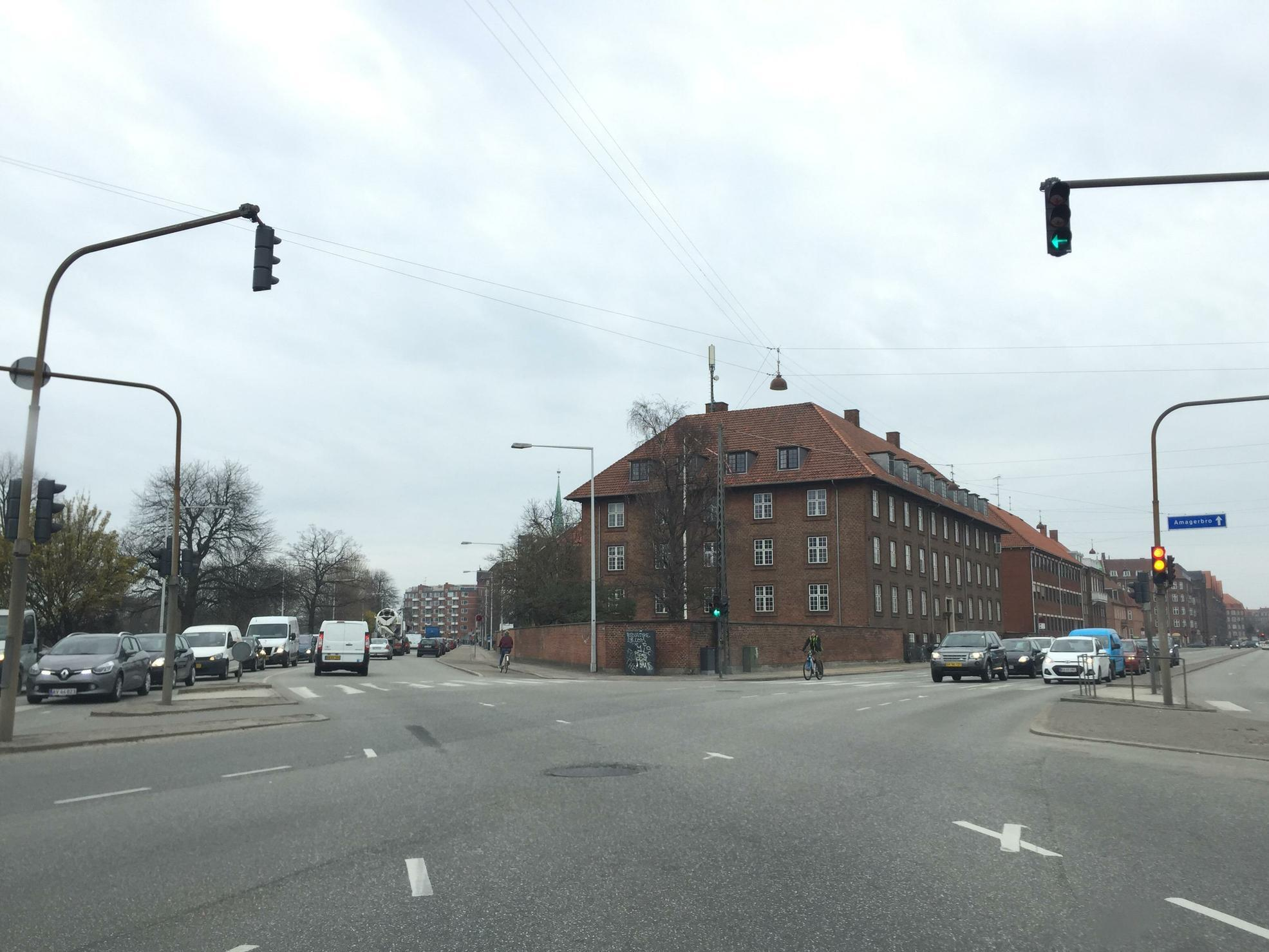 Kvinderegensen